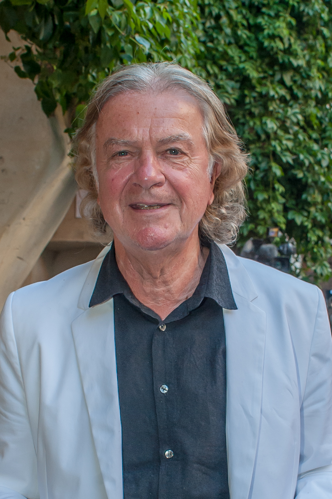 Wachaufestspiele Weißenkirchen: Premiere von „Der Brandner Kaspar und das ewig’ Leben“ am 19. Juli 2016 in Weißenkirchen. Bild zeigt Peter Hofbauer.